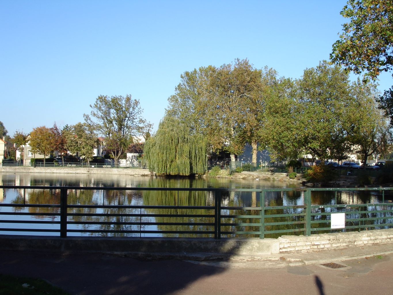 Lac Sévigné à Livry-Gargan (France) - Novembre 2006 Photo personnelle de clicsouris